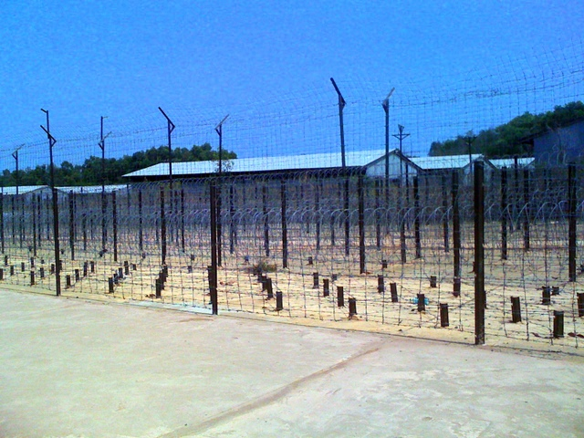 Gefänginsanlage auf Phu Quoc,nunmehr neu erstellt als Museum